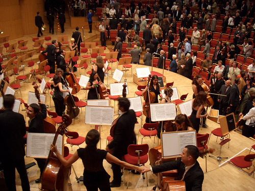 auteur: lichtundschatten site internet